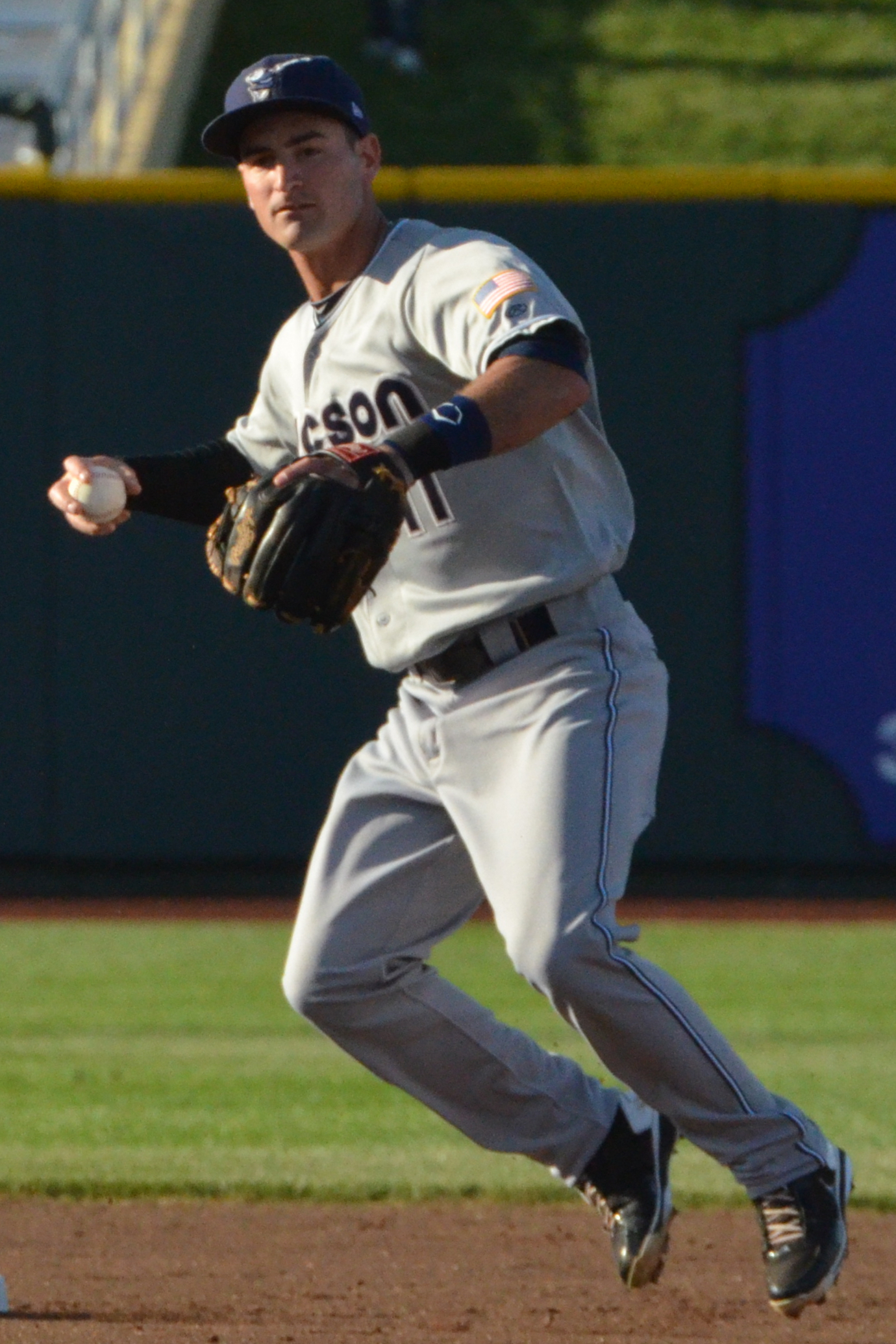 Dean Anna